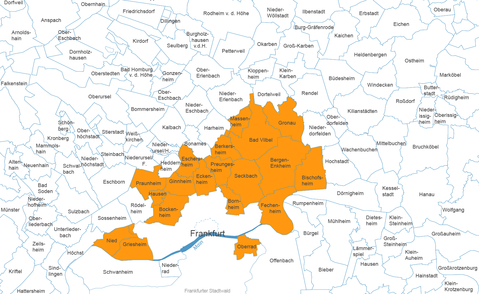 Karte der Ausmaße des Amtes Bornheimerberg, dargestellt in den Gemarkungen heutiger Gemeinden bzw. Ortsteile.